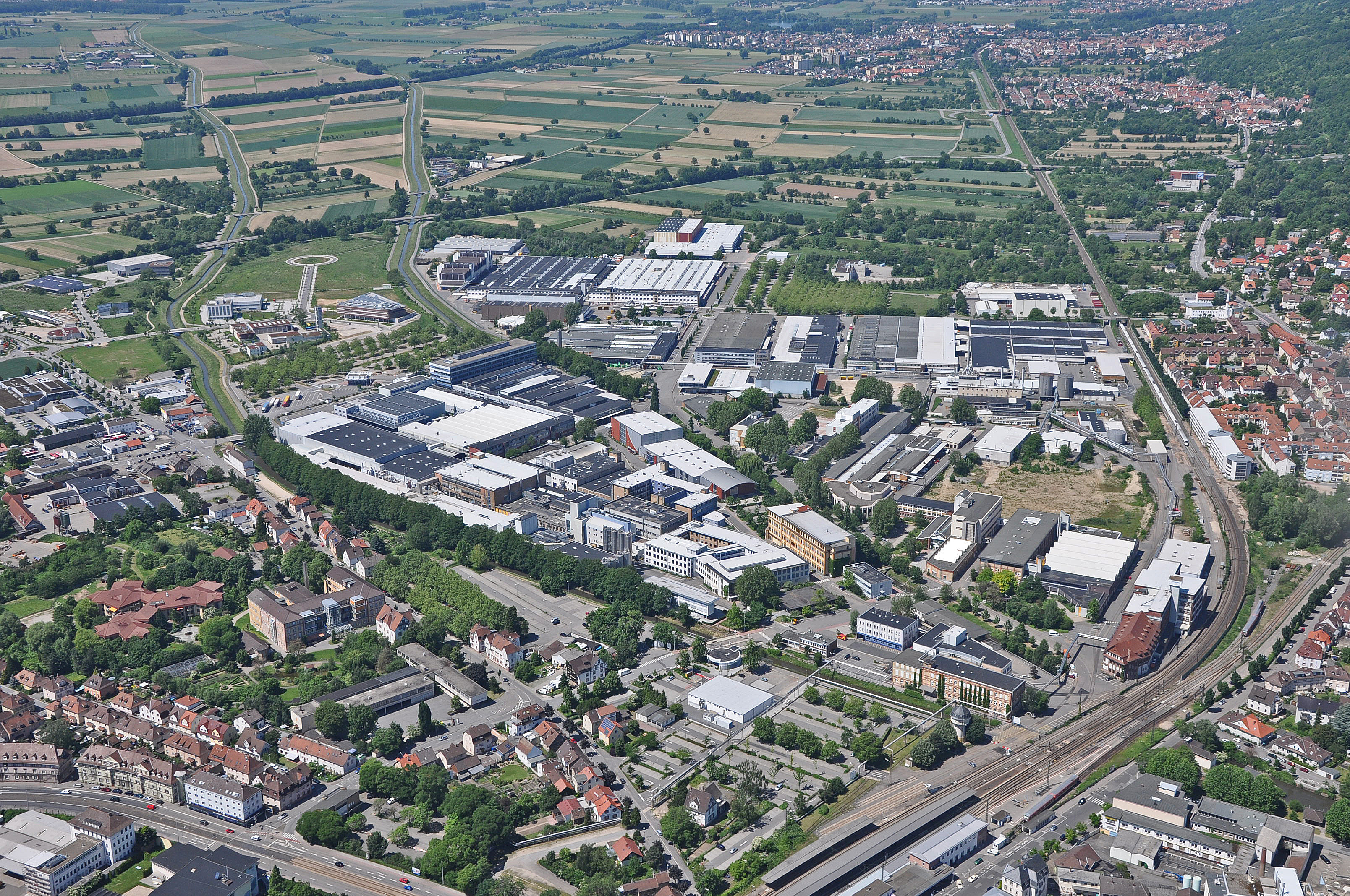 Luftaufnahme des Freudenberg-Standorts in Weinheim, Hauptsitz der Freudenberg Gruppe, aufgenommen am 5. Juni 2010.